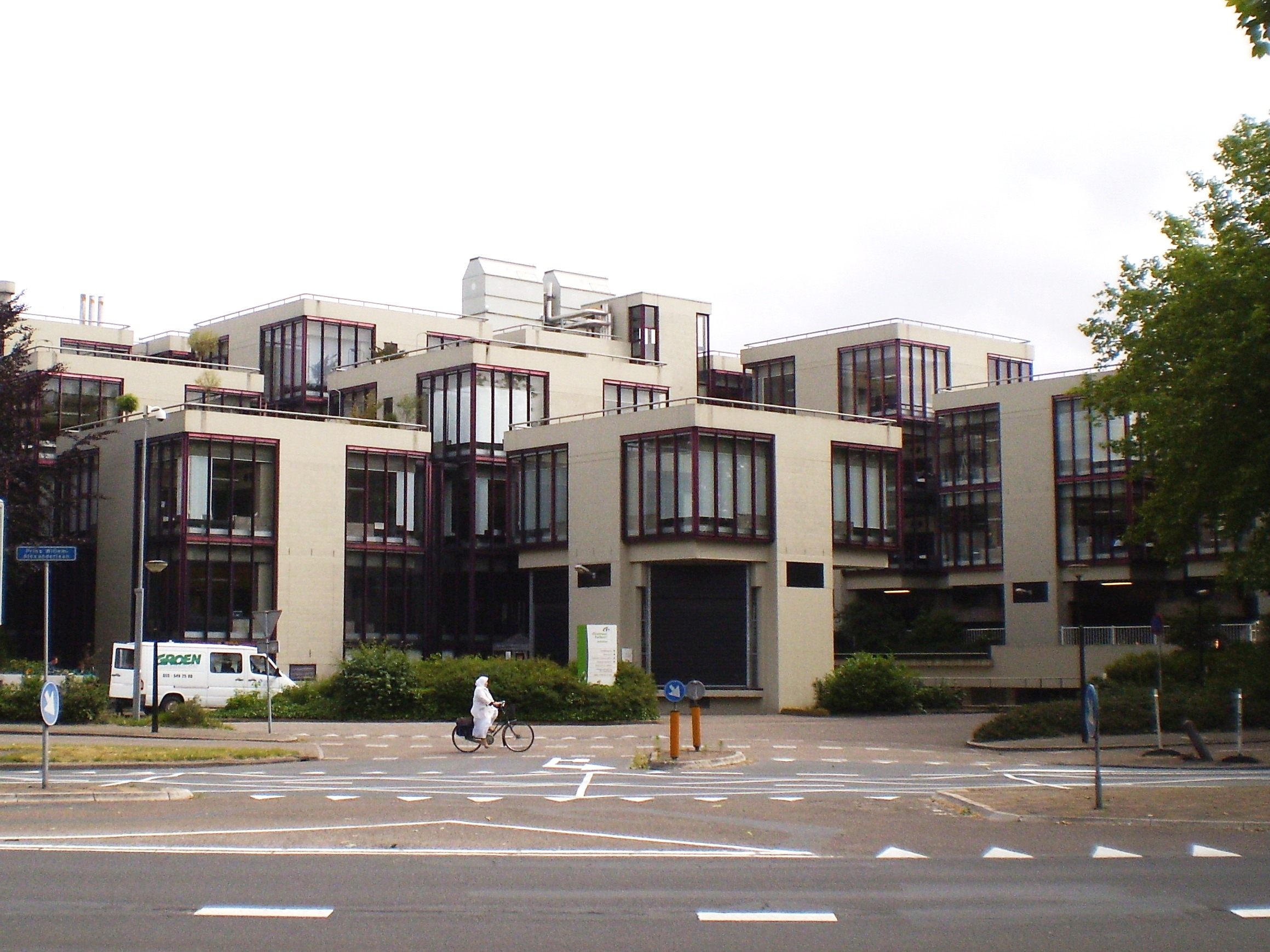 Centraal Beheer office, Apeldoorn